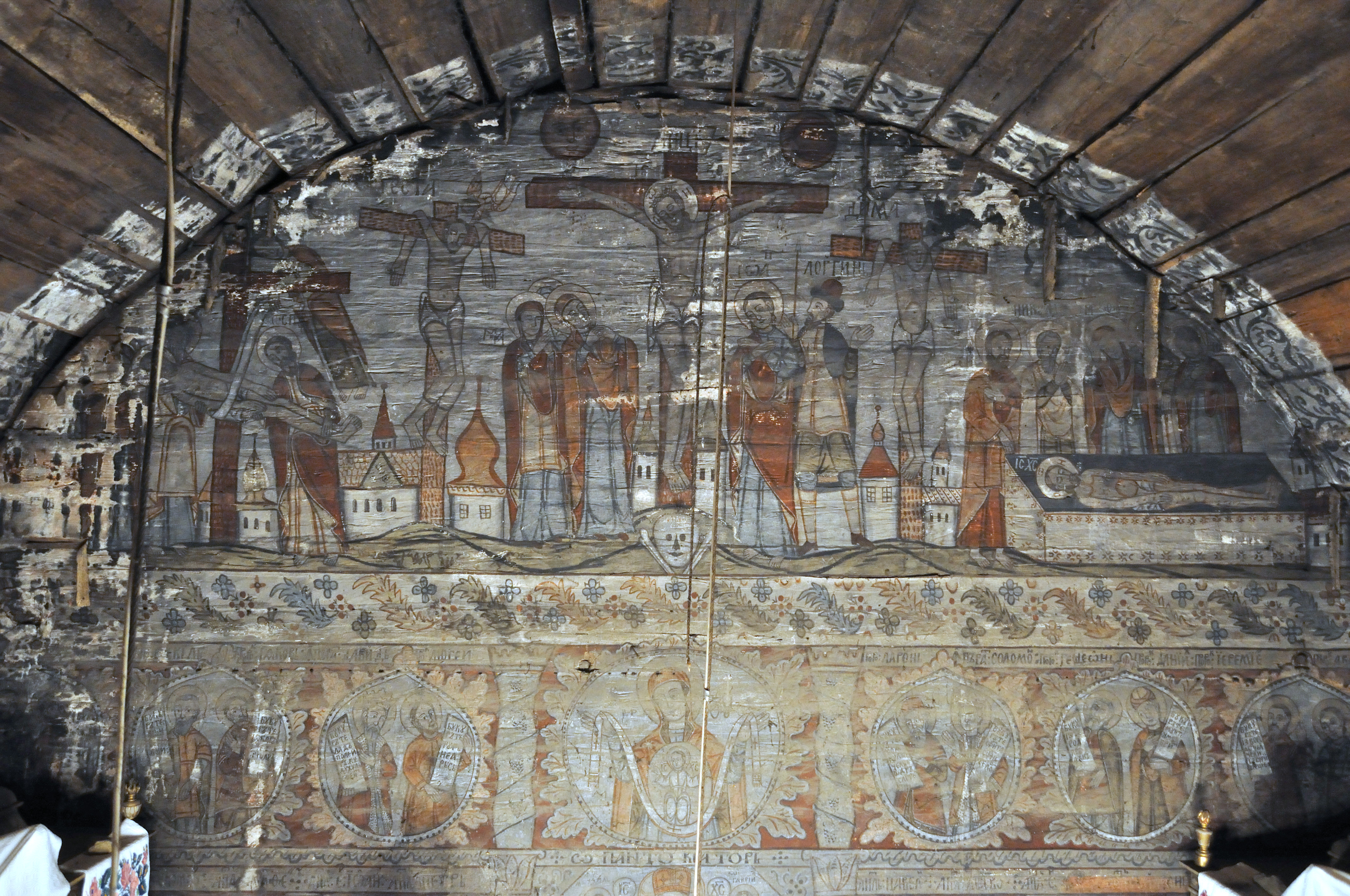 Biserica de lemn din Budești Susani, comuna Budești, județul Maramureș